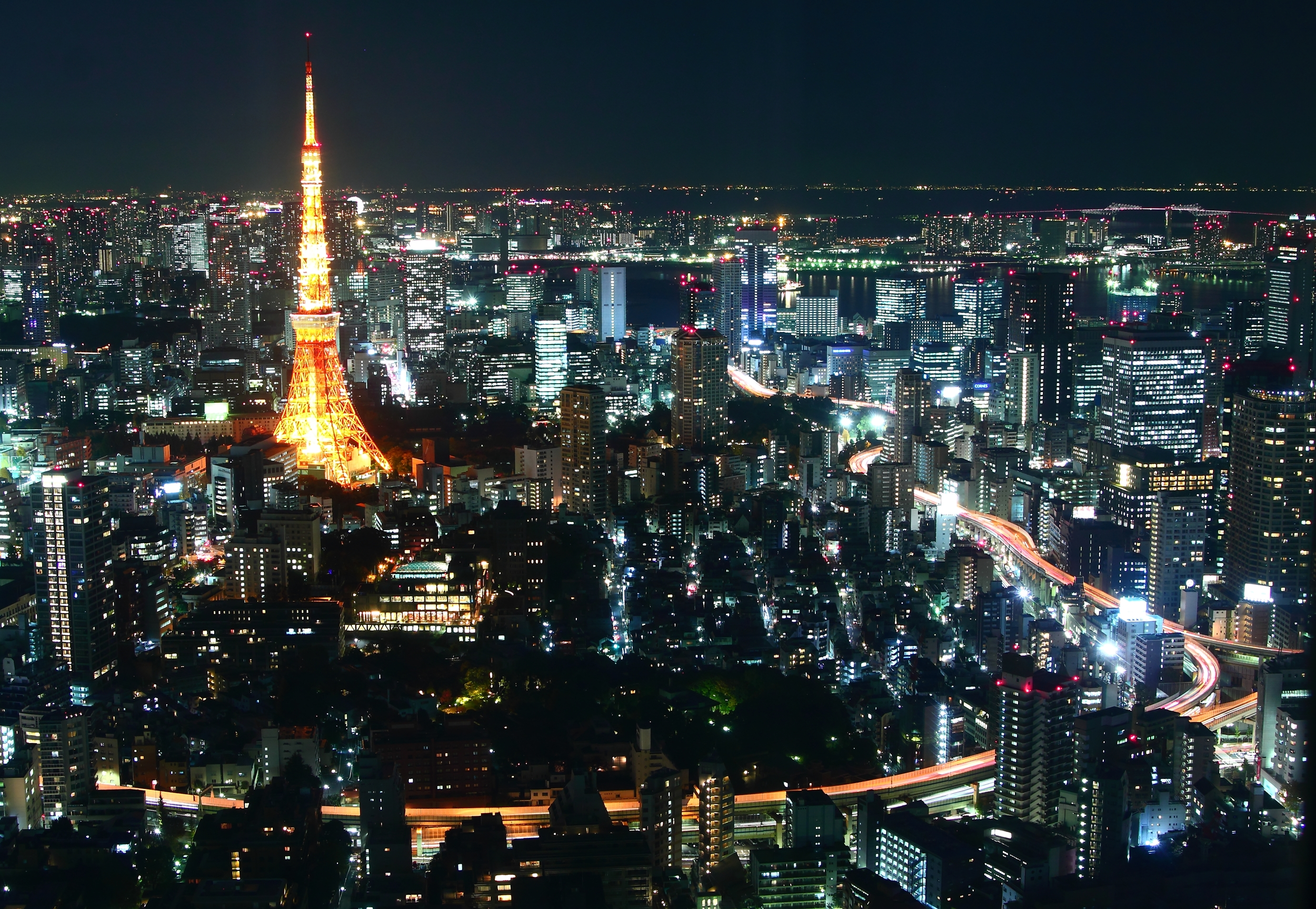 東京タワー（六本木ヒルズより）